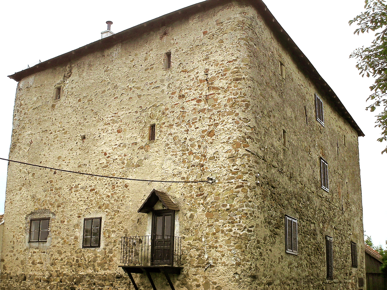 Zeiselmauer, Körnerkasten, Ansicht vom Norden